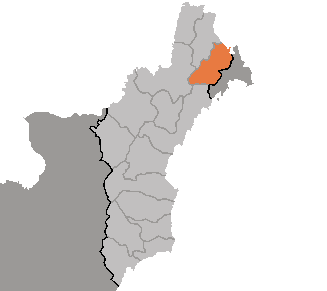 Map of Undok, Hamgyong-pukto, DPRK, 2006